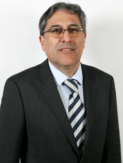 Miguel Ángel Alvarado Ramírez, político chileno.